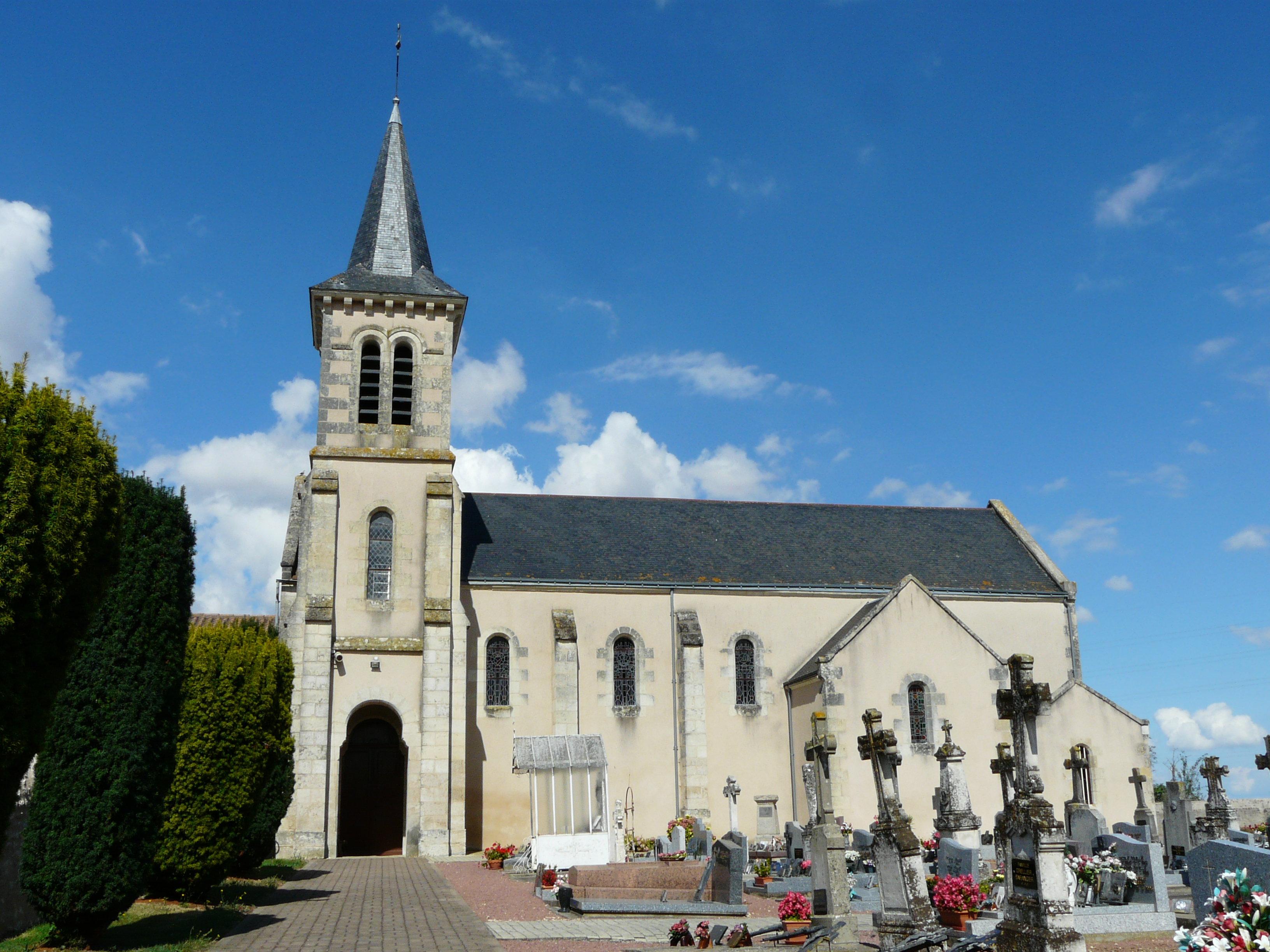 L'église Saint-Martin des Jumeaux, Assais-les-Jumeaux, Deux-Sèvres, France.